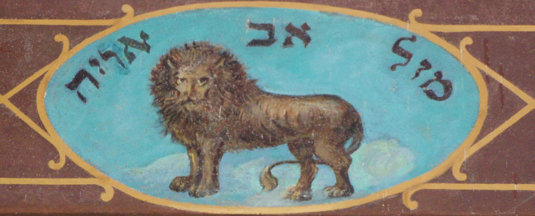 Znaki zodiaku na belkowaniu galerii dla kobiet synagogi Kupa w Krakowie